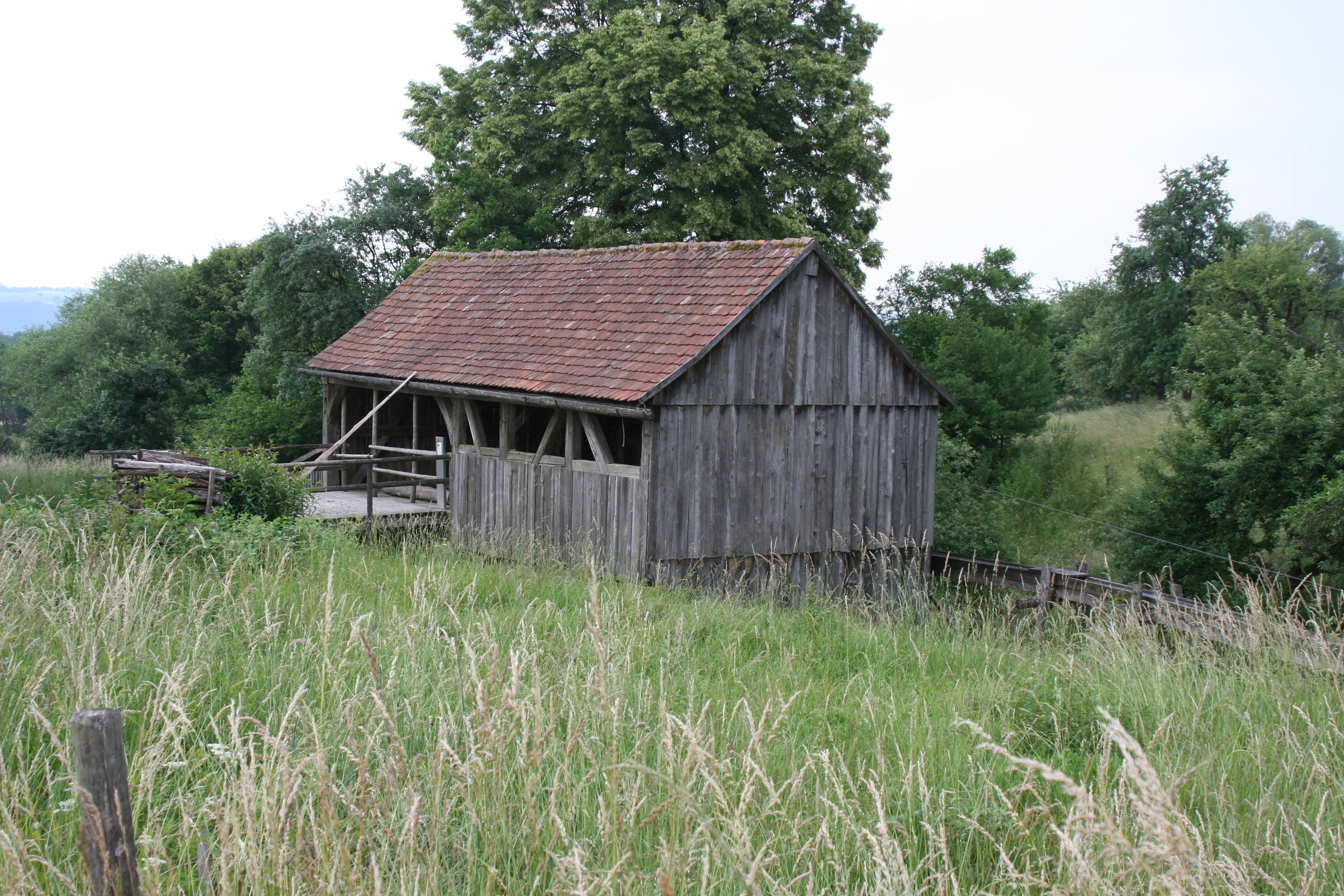 Sägemühle aus Schmidbügel im Freilandmuseum Wackershofen